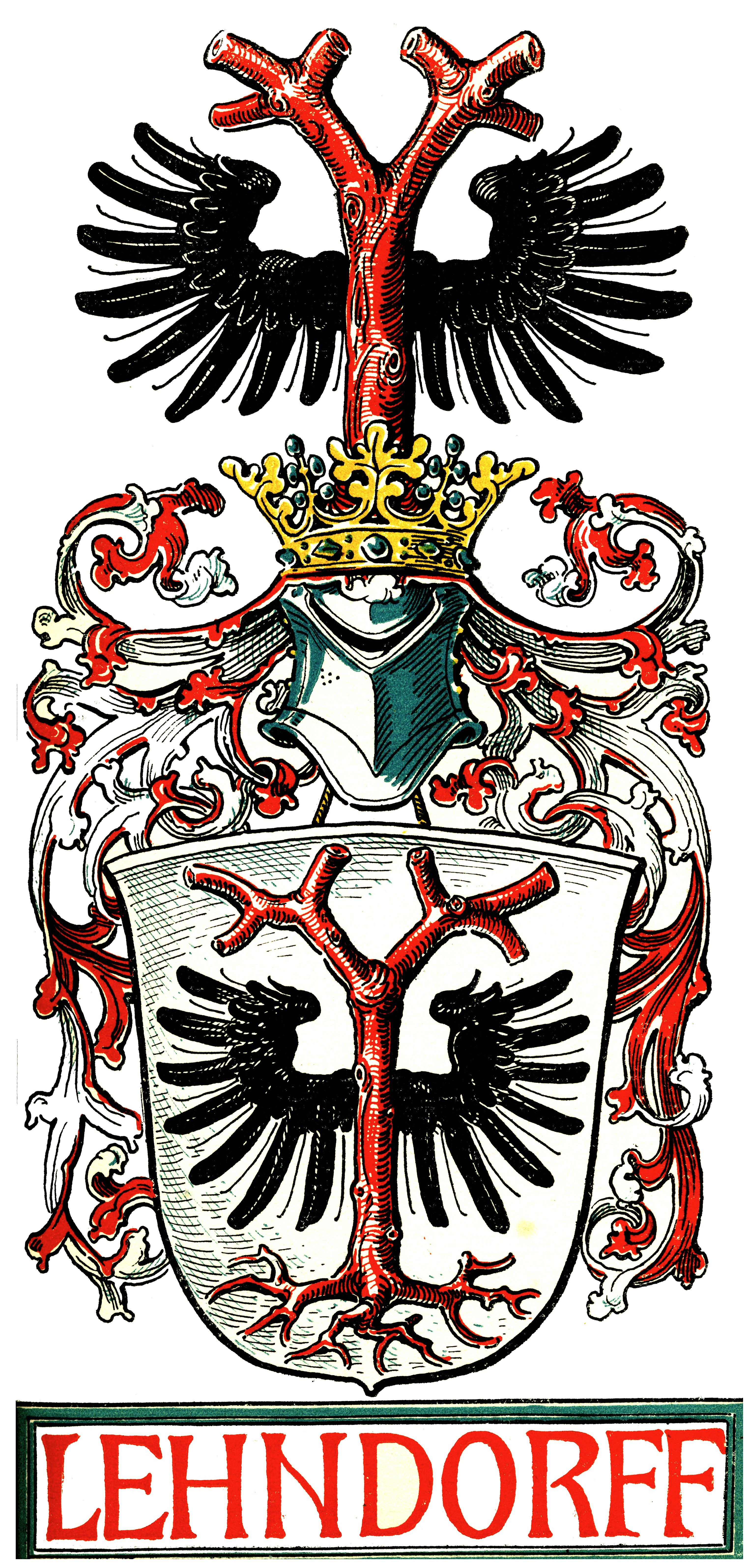 Stammwappen derer Lehndorff